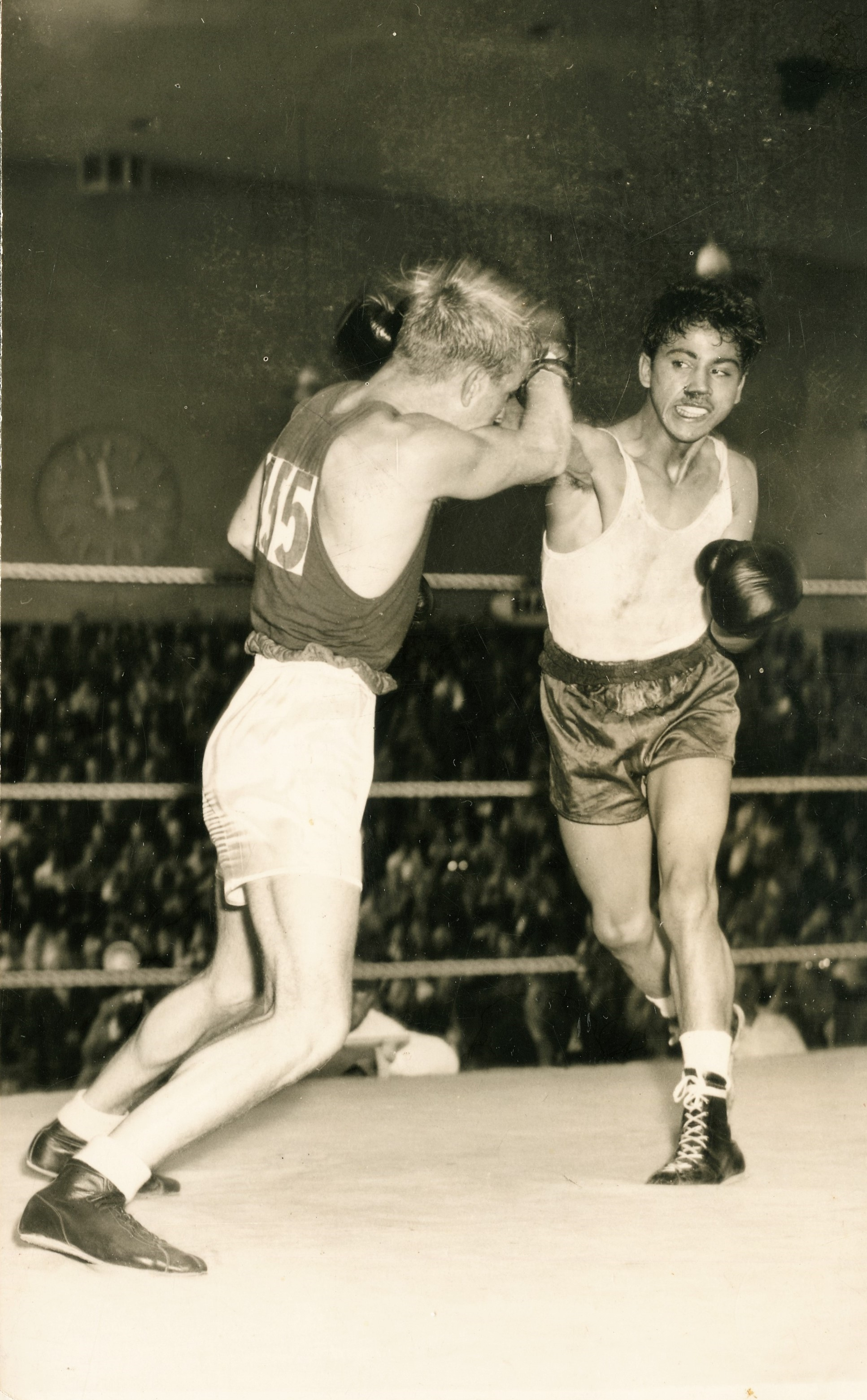 Fotografia do Fundo Correio da Manhã, sob a guarda do Arquivo Nacional.